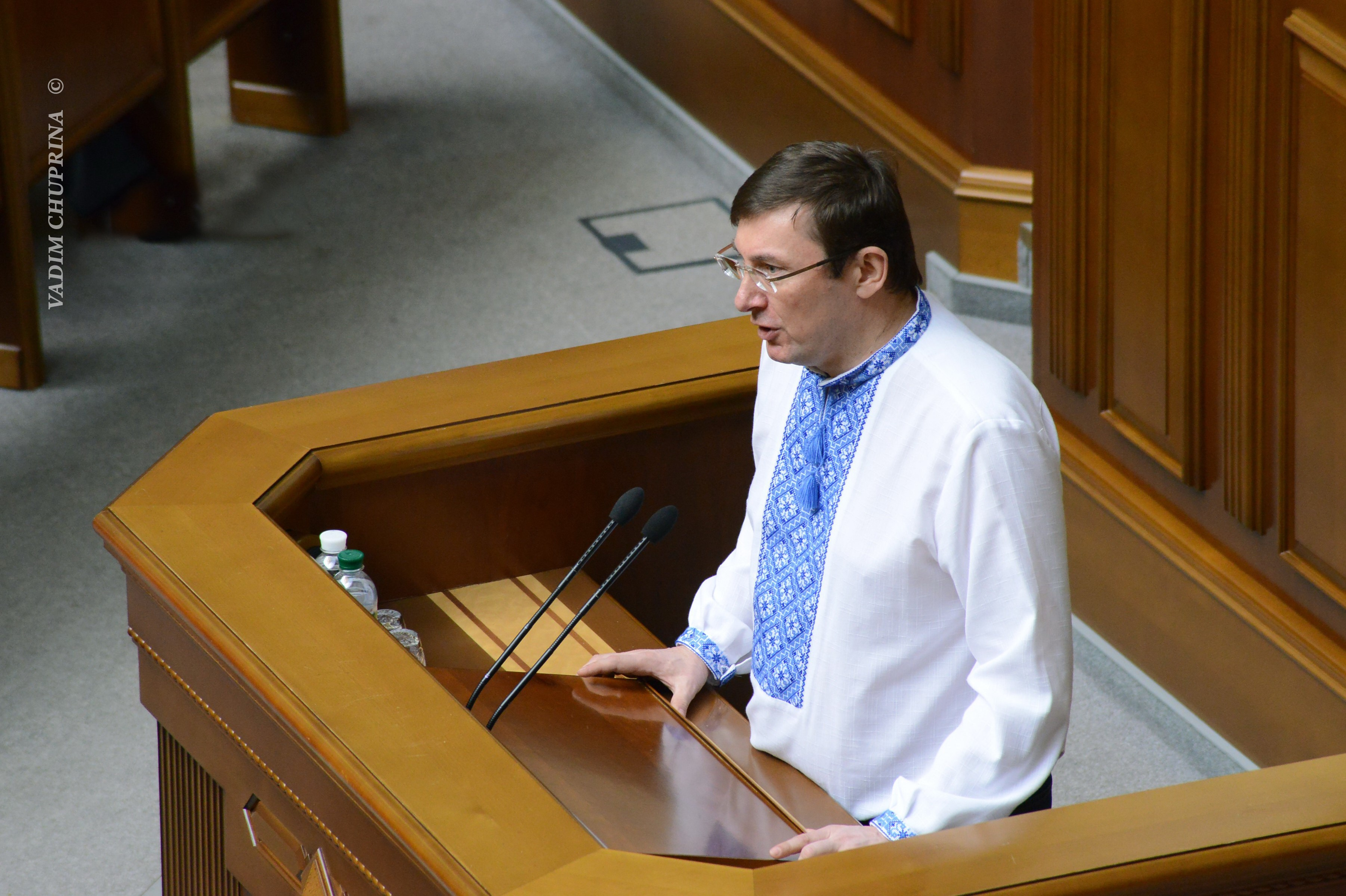 ВЕРХОВНА РАДА УКРАЇНИ 2015 фотограф Вадим Чуприна